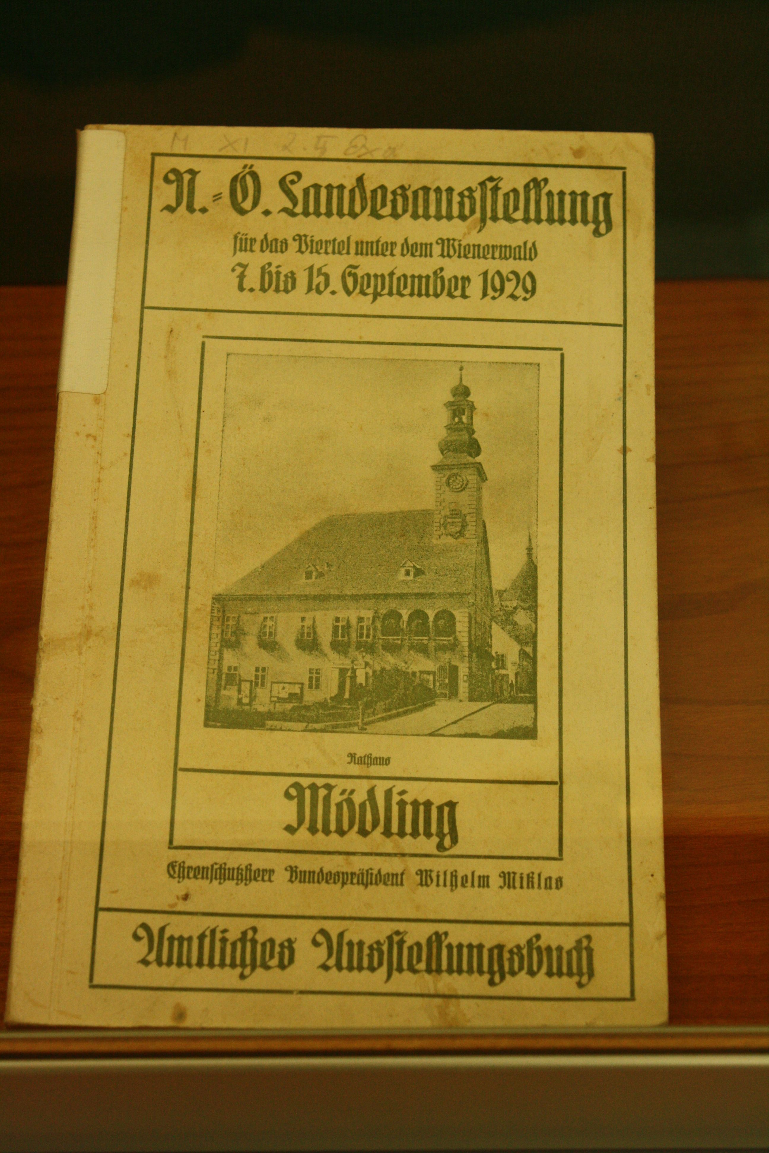 Festschrift zur NÖ Landesausstellung 1929 im Heimatmuseum Mödling